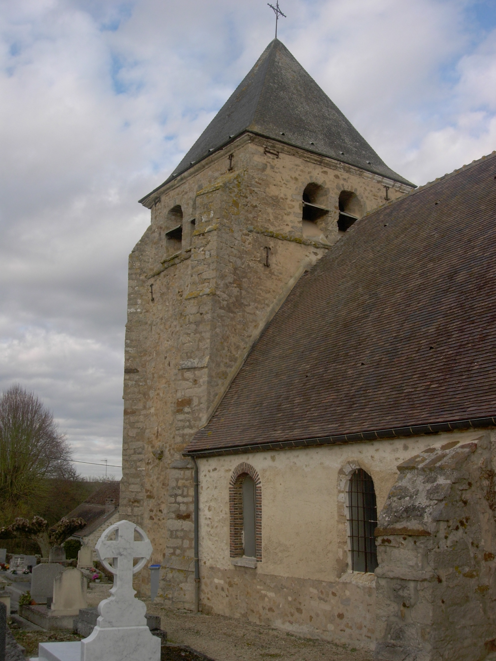 Eglise d'Avant-les-Marcilly